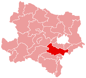 Karte: politischer Bezirk Baden Lizenz: GNU FDL Quelle: Zeichnung plp Datum: de:2004 Ort: Wien